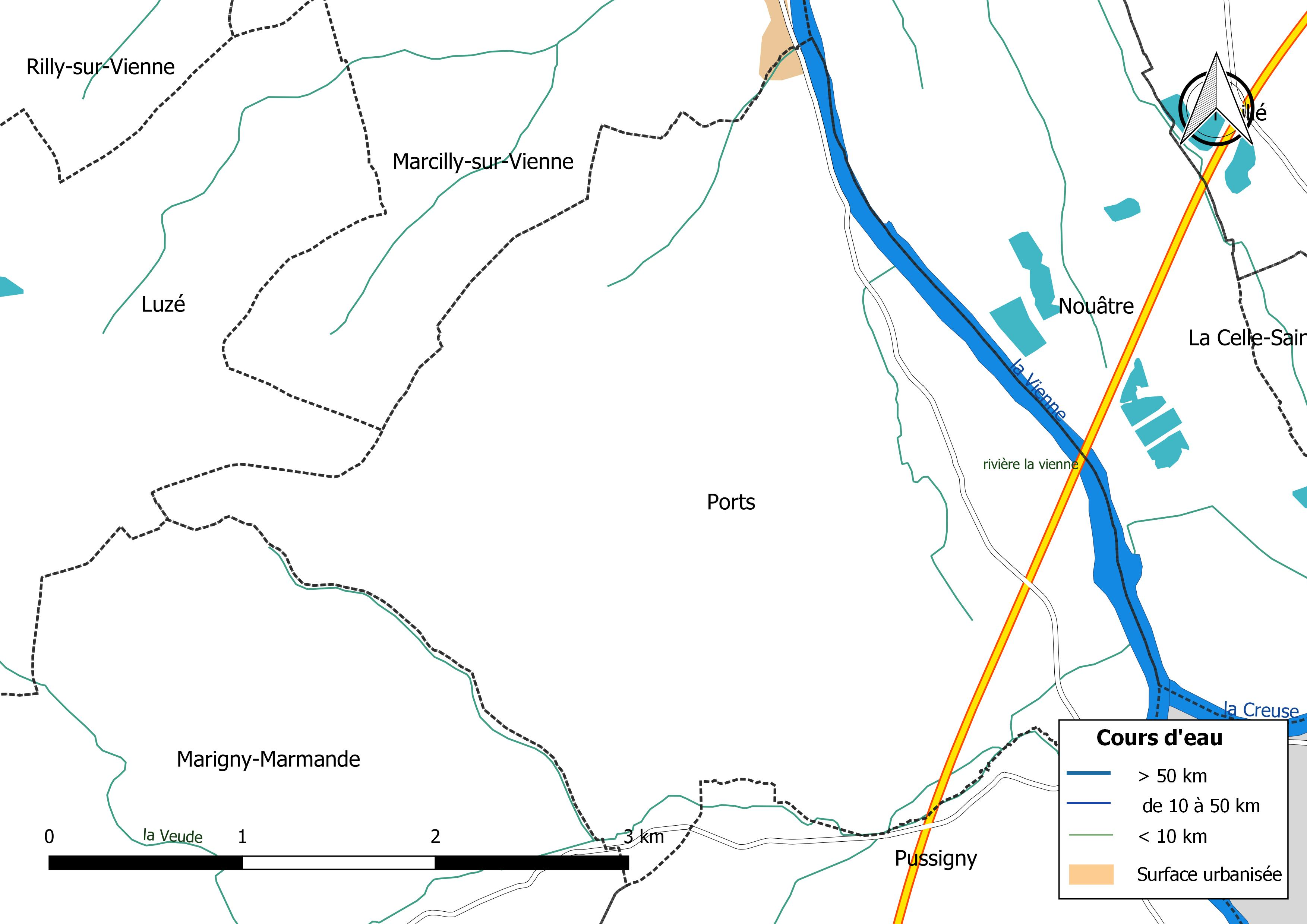 Carte du réseau hydrographique de la commune de Ports (Indre-et-Loire) (France).